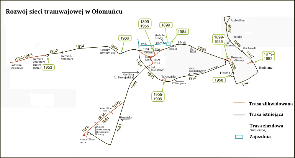 Historický vývoj tramvajové sítě v Olomouci.